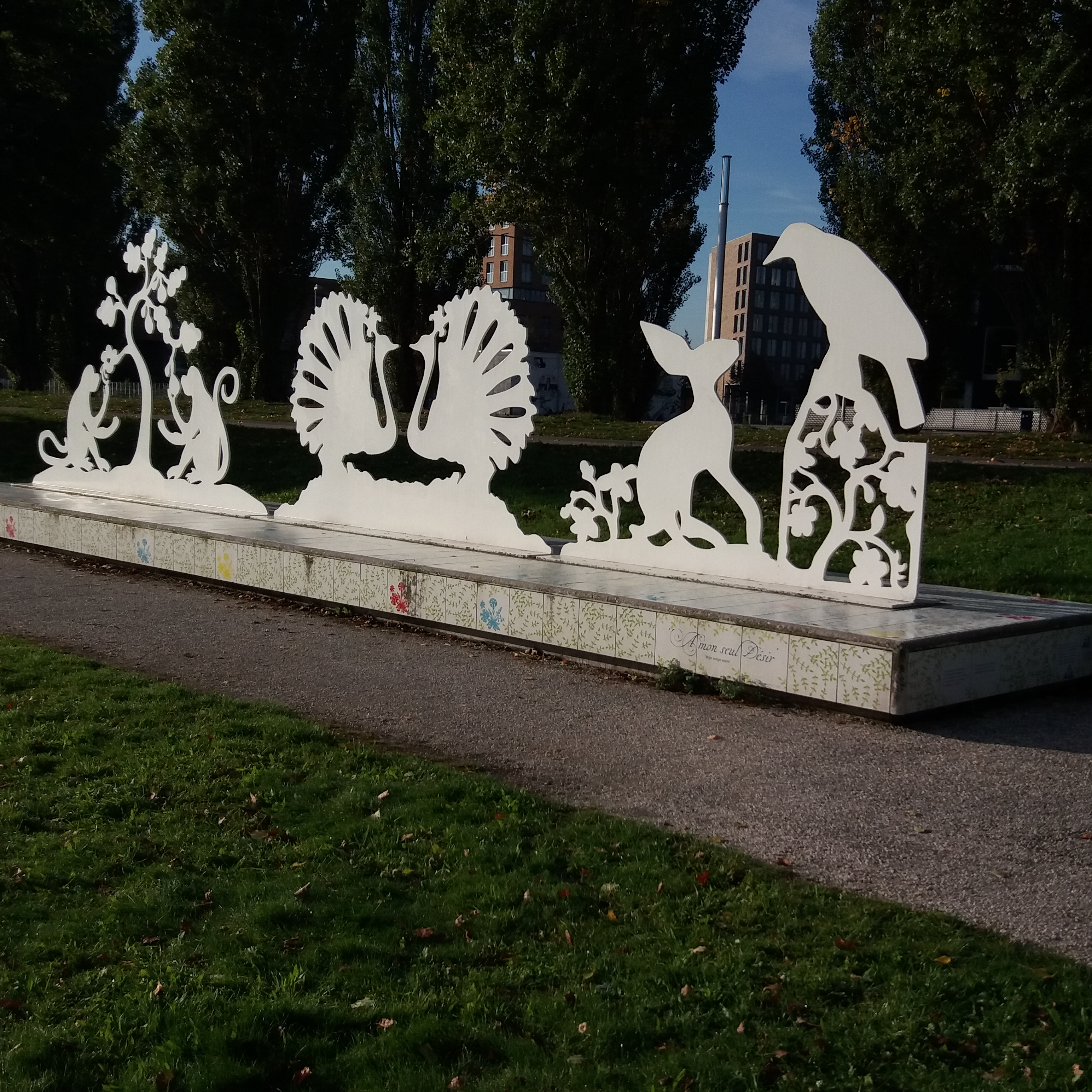 Kunstwerk À mon seul désir van Margot Berkman en Eline Janssens. Park Leeuwesteyn, in de wijk Leidsche Rijn te Utrecht.